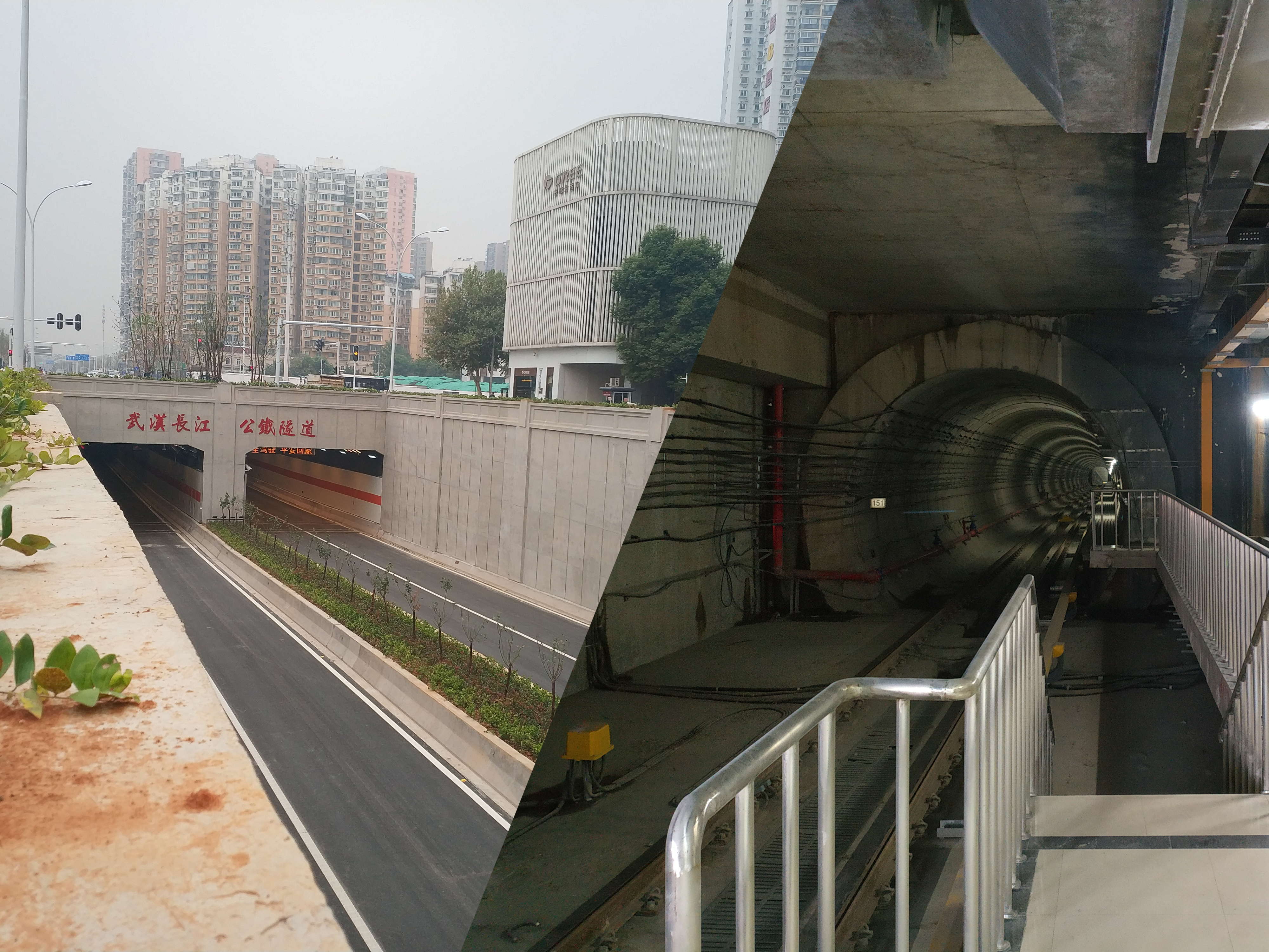 左侧：武汉长江公铁隧道秦园路出入口 右侧：从徐家棚站看到的武汉长江公铁隧道7号线南侧隧道口